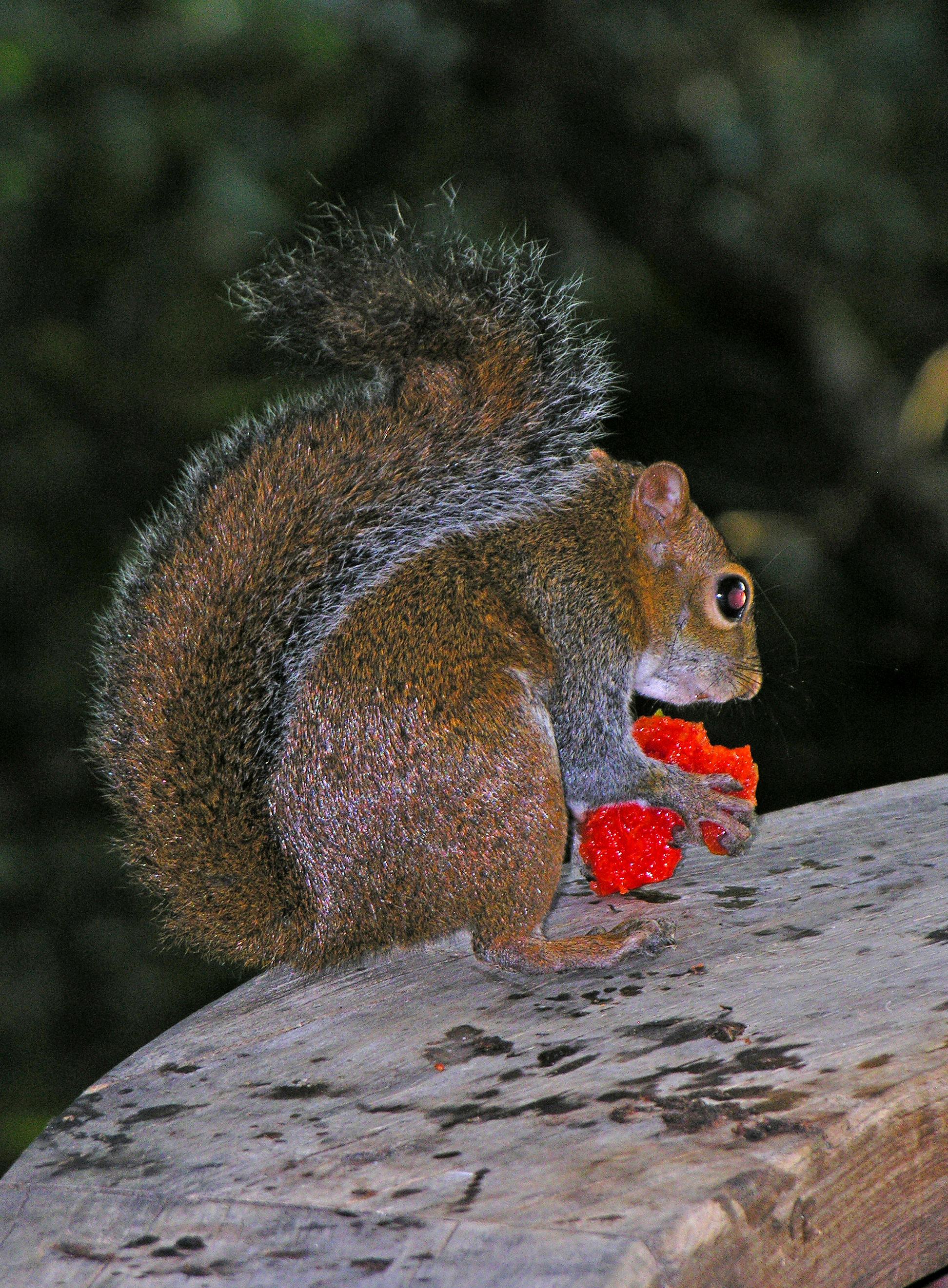 Squirrel